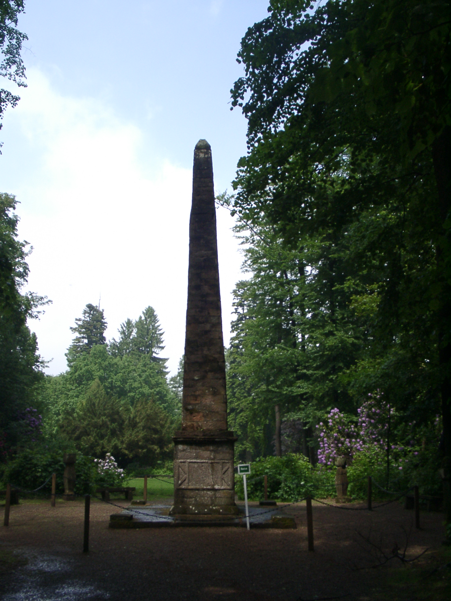 Eulbach, Englischer Garten, Obelisk